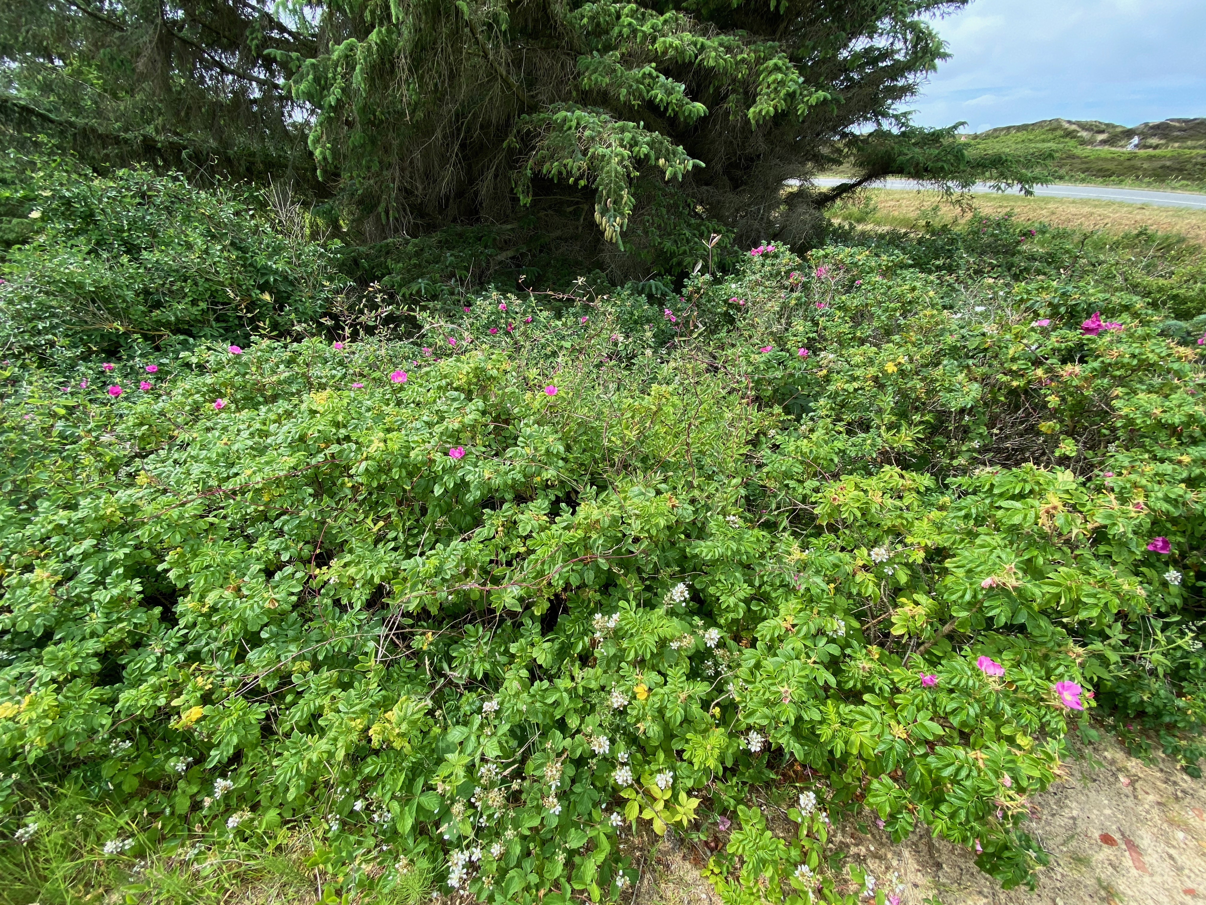 Rechteckdolmen im Hünenbett bei Kampen auf Sylt (Deutschland/Germany), Sprockhoff-Liste Nr. 2, 28.06.2020, Fundstelle vollständig von Sylt-Rose (Rosa rugosa) überwachsen.